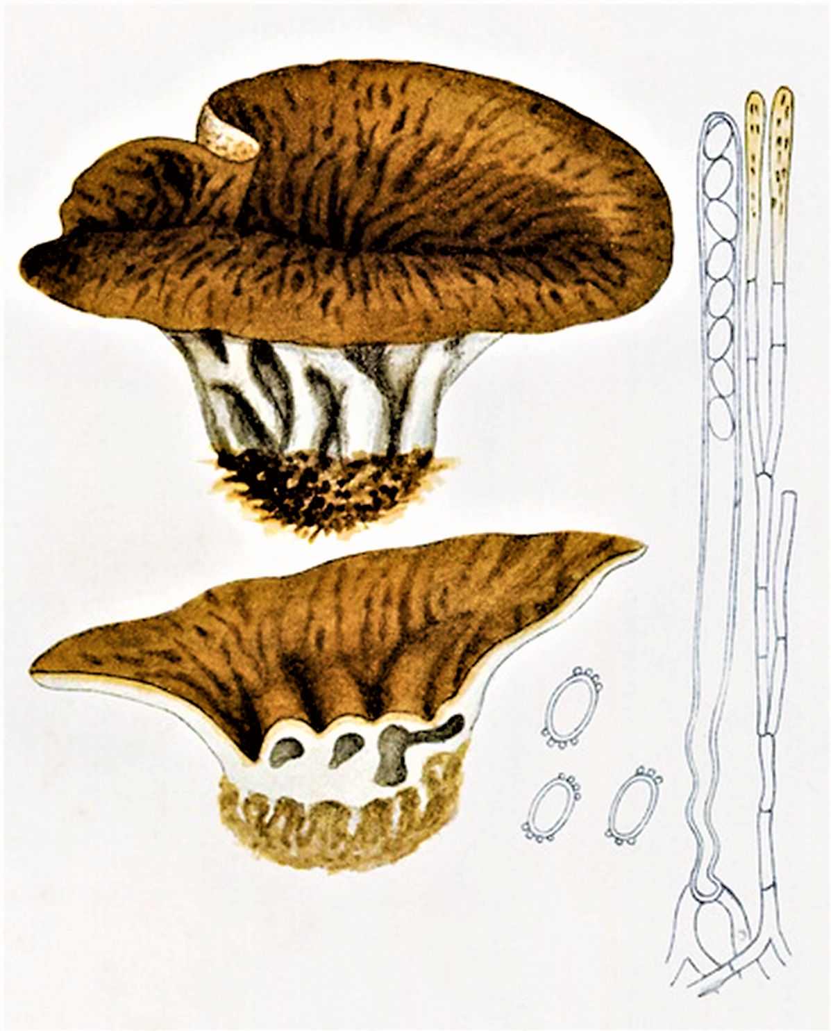 Giacomo Bresadola : Discina venosa (Pers., 1801) Fr. (1821), heute Disciotis venosa |Pers.) Arnould (1893)